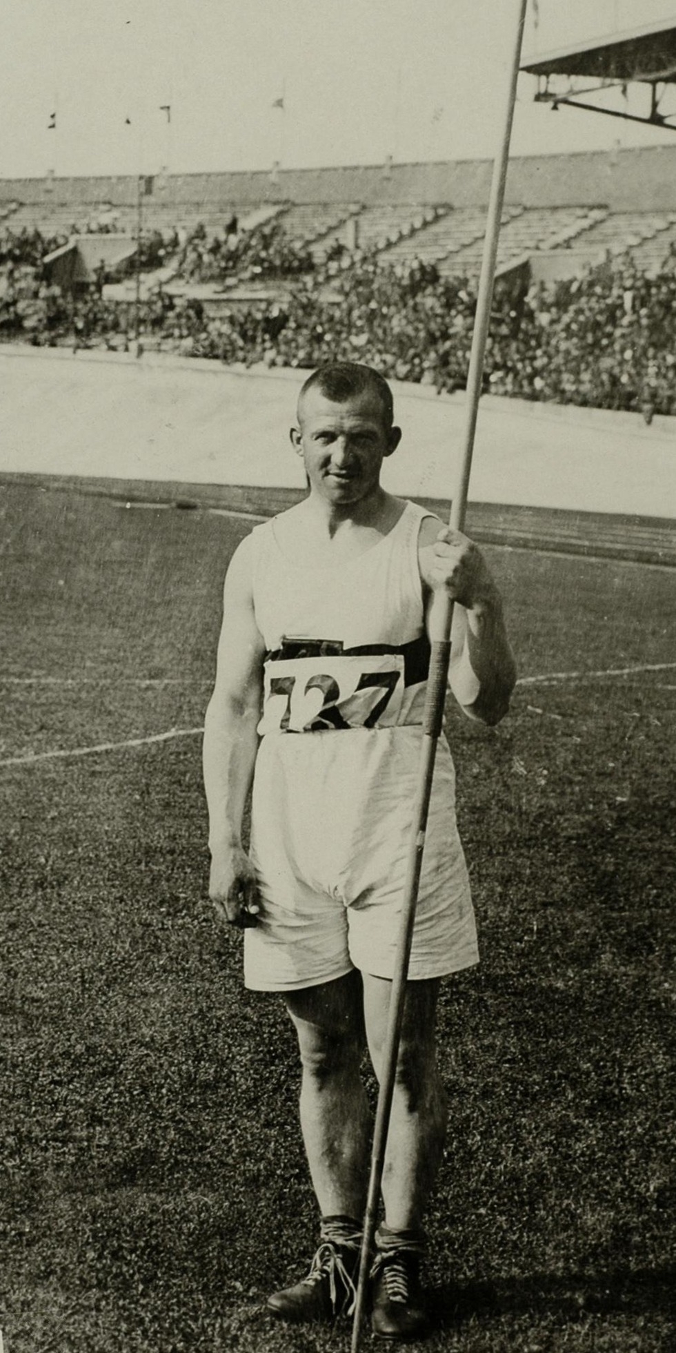 Sport. Sport, Olympische Spelen Amsterdam, 1928 : De Duitse speerwerper B. Schlokat.